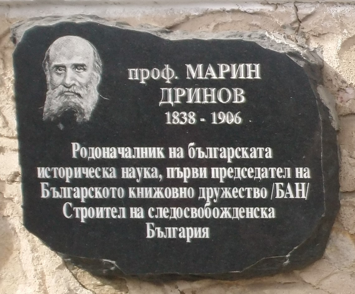 проф. Марин Дринов (1838 - 1906) - плоча в Исторически музей Панагюрище - Надпис: Родоначалник на българската историческа наука, първи председател на Българското книжовно дружество (БАН). Строител на следосвобожденска България.